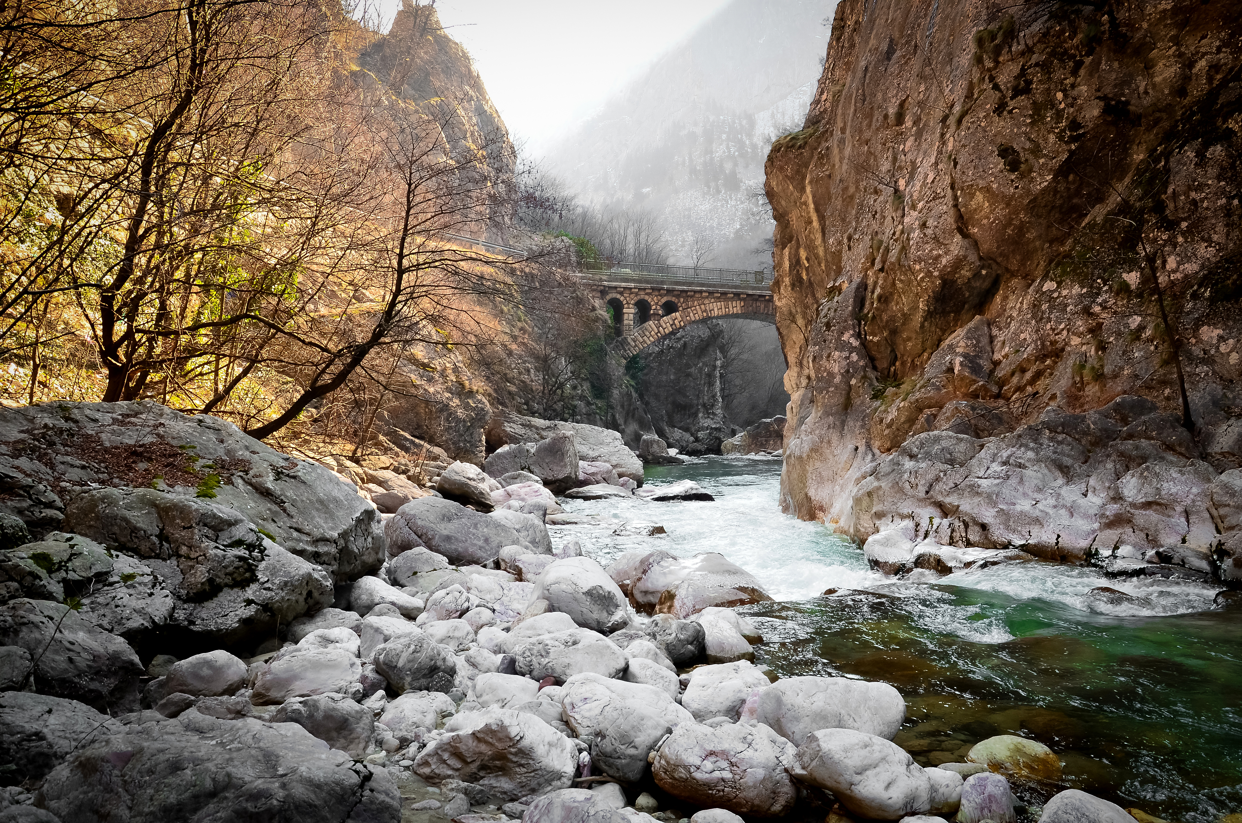 Ura në grykën e Rugovës